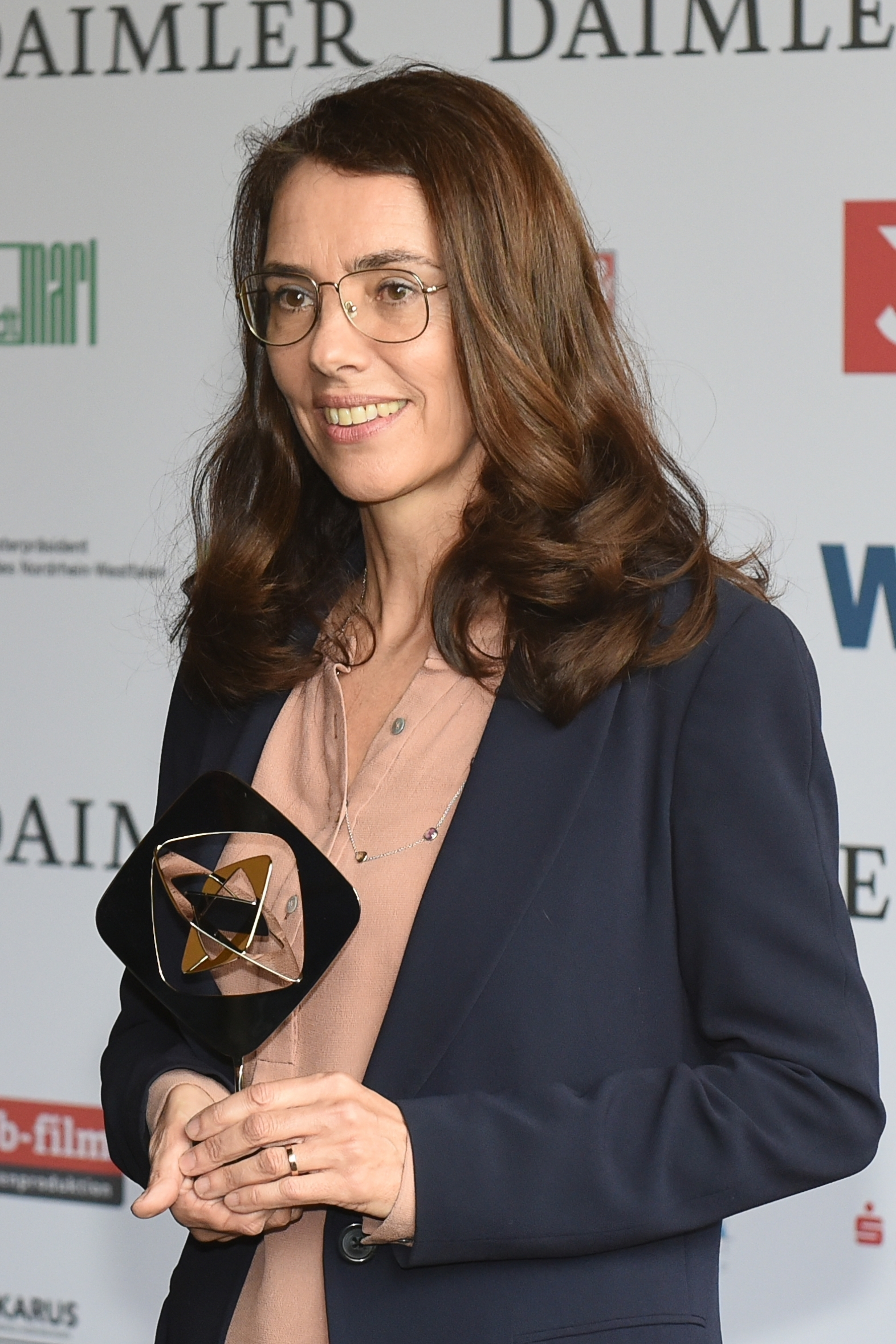 Verleihung des Grimme-Preises 2019.